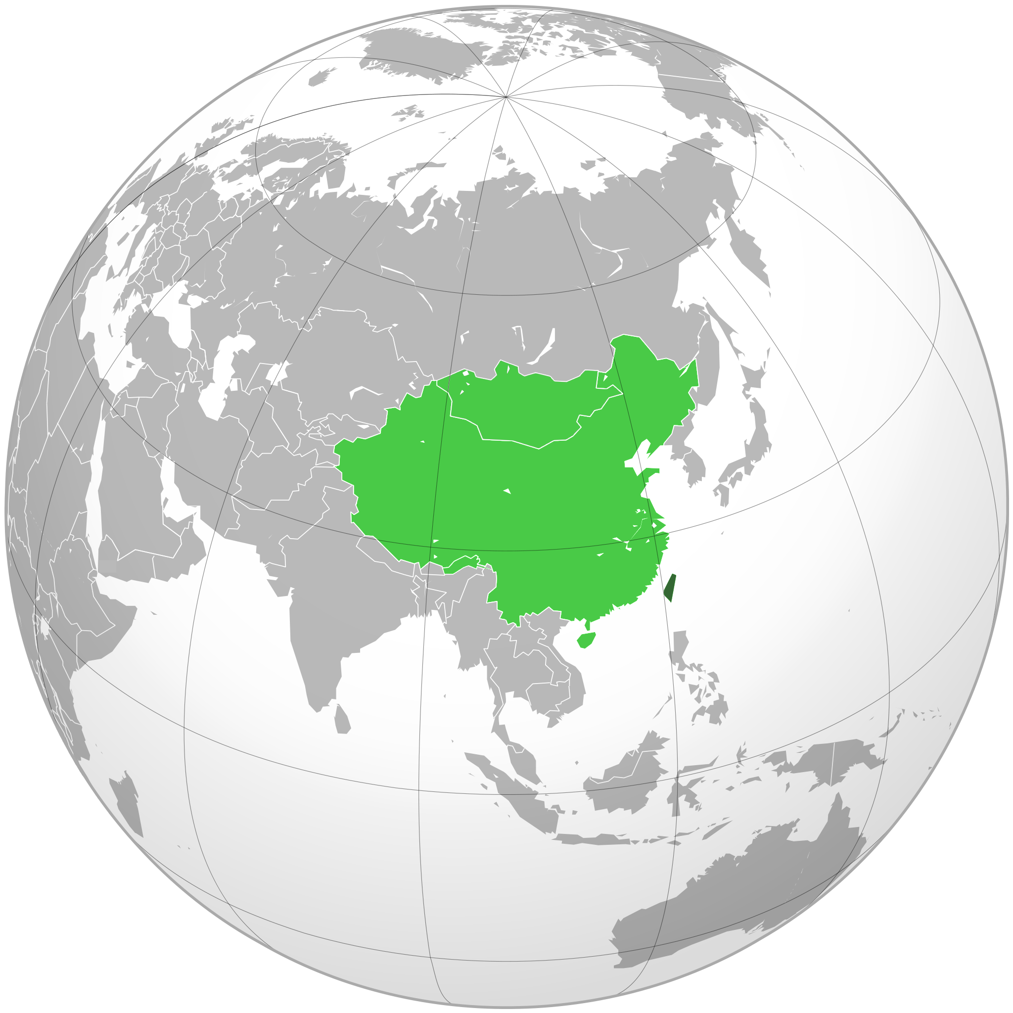 中華民國（深綠色）及其中華人民共和國在大陸擁有主權的地區（淺綠色）。